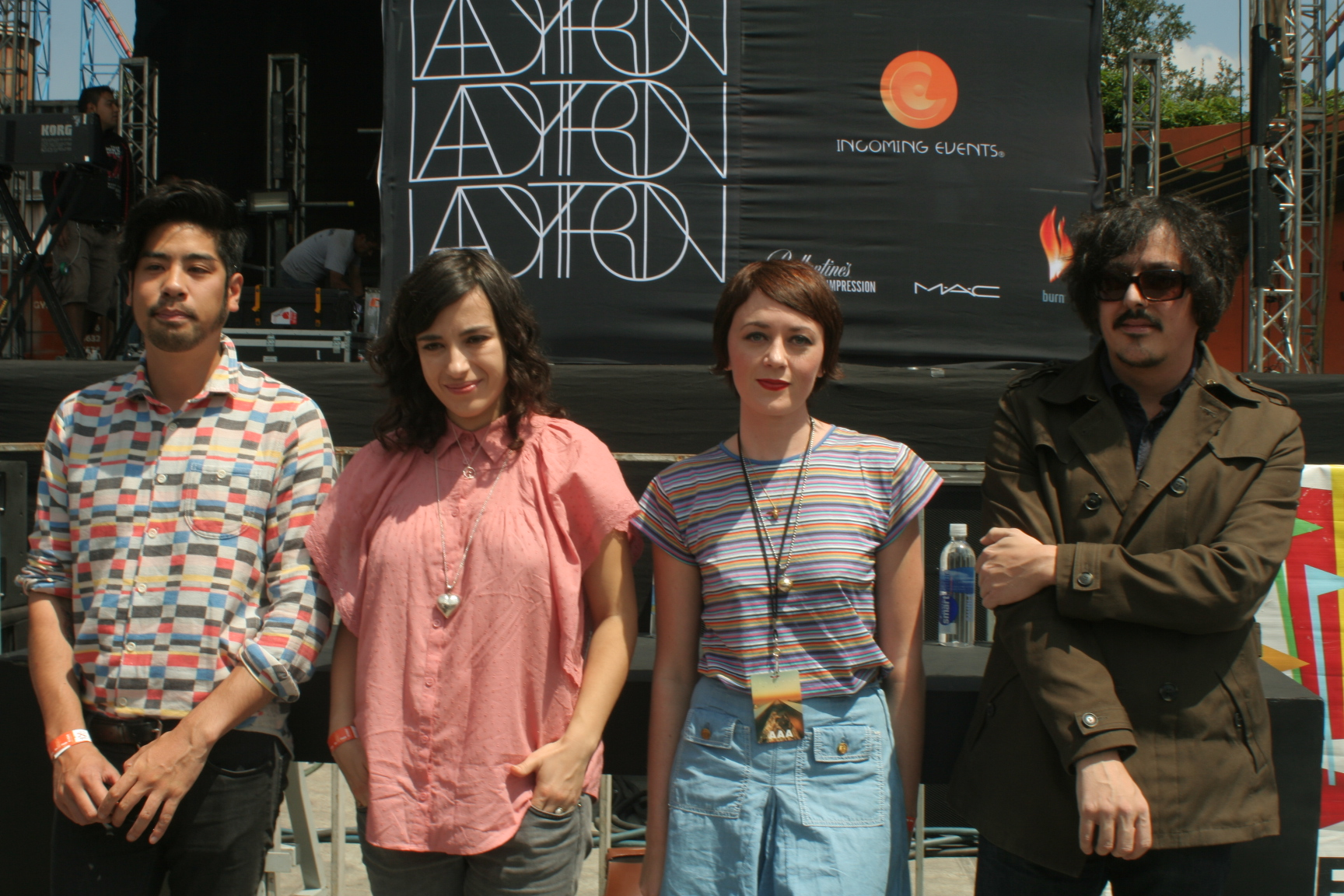 Ladytron conference in Mexico (2011)